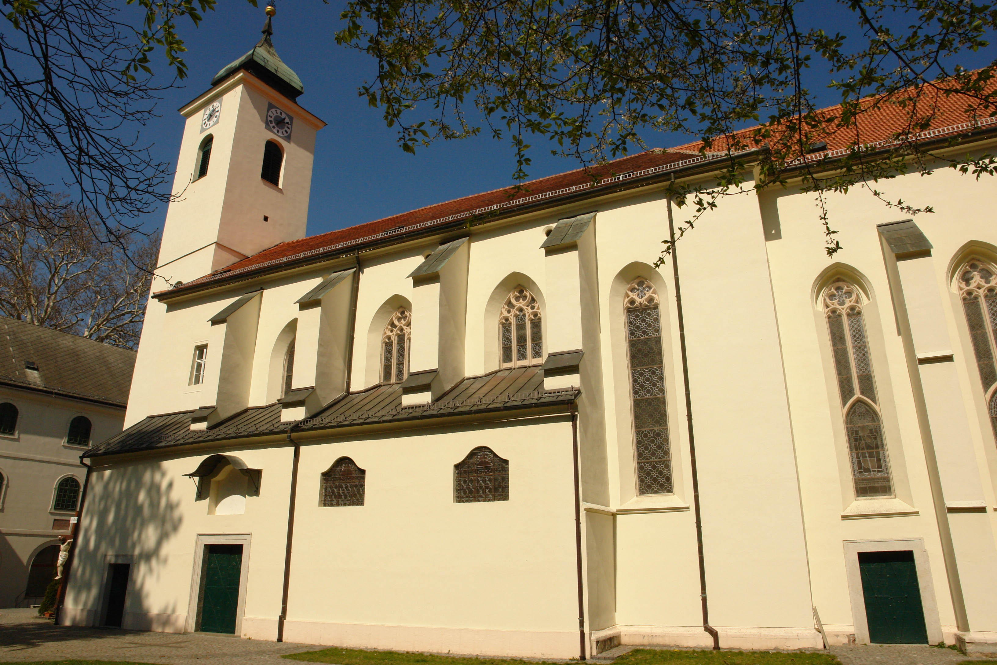 Máriavölgy (Marianka) kolostor templom, zarándokhely